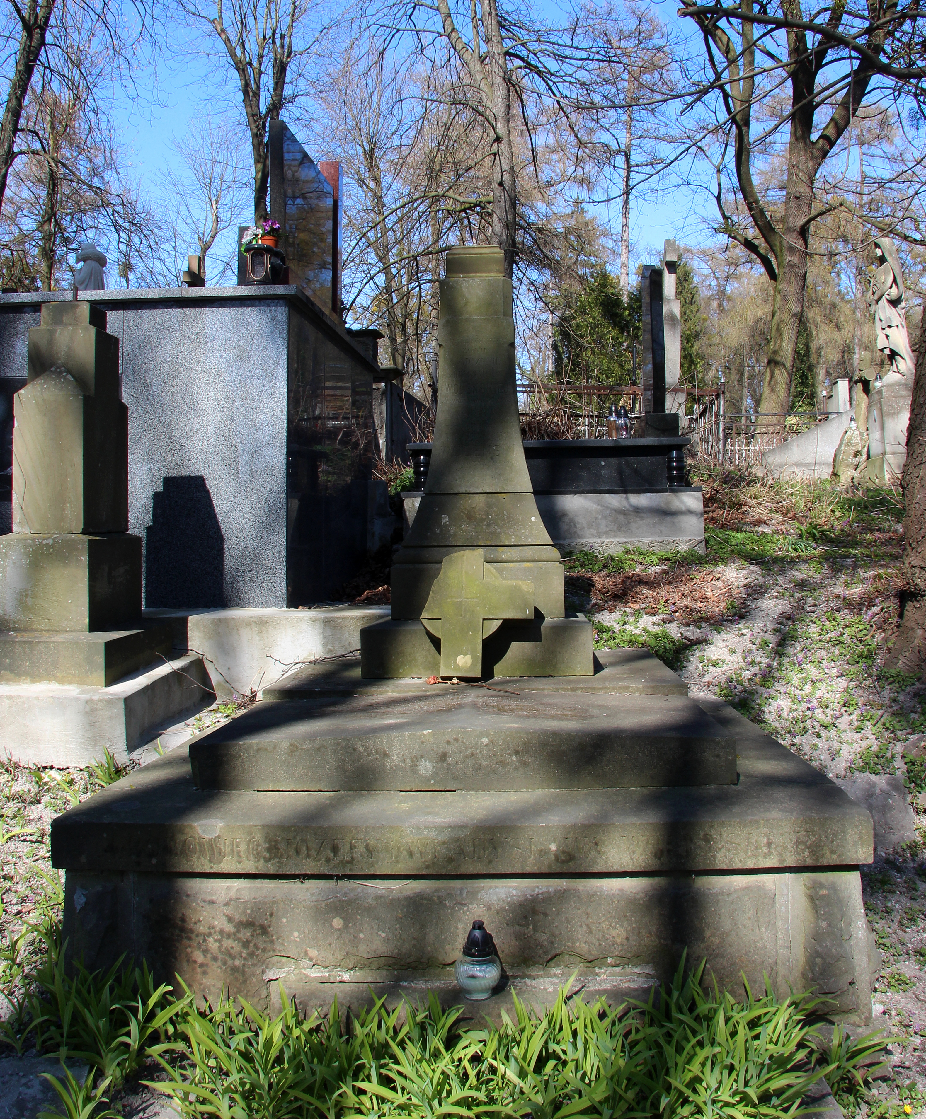 Гробівець Й.та В. Воленських.Личаківський цвинтар поле № 73.